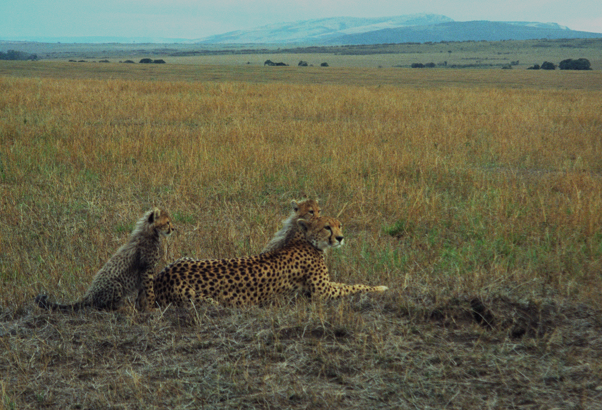 Cheetah, Masai Mara, Kenya